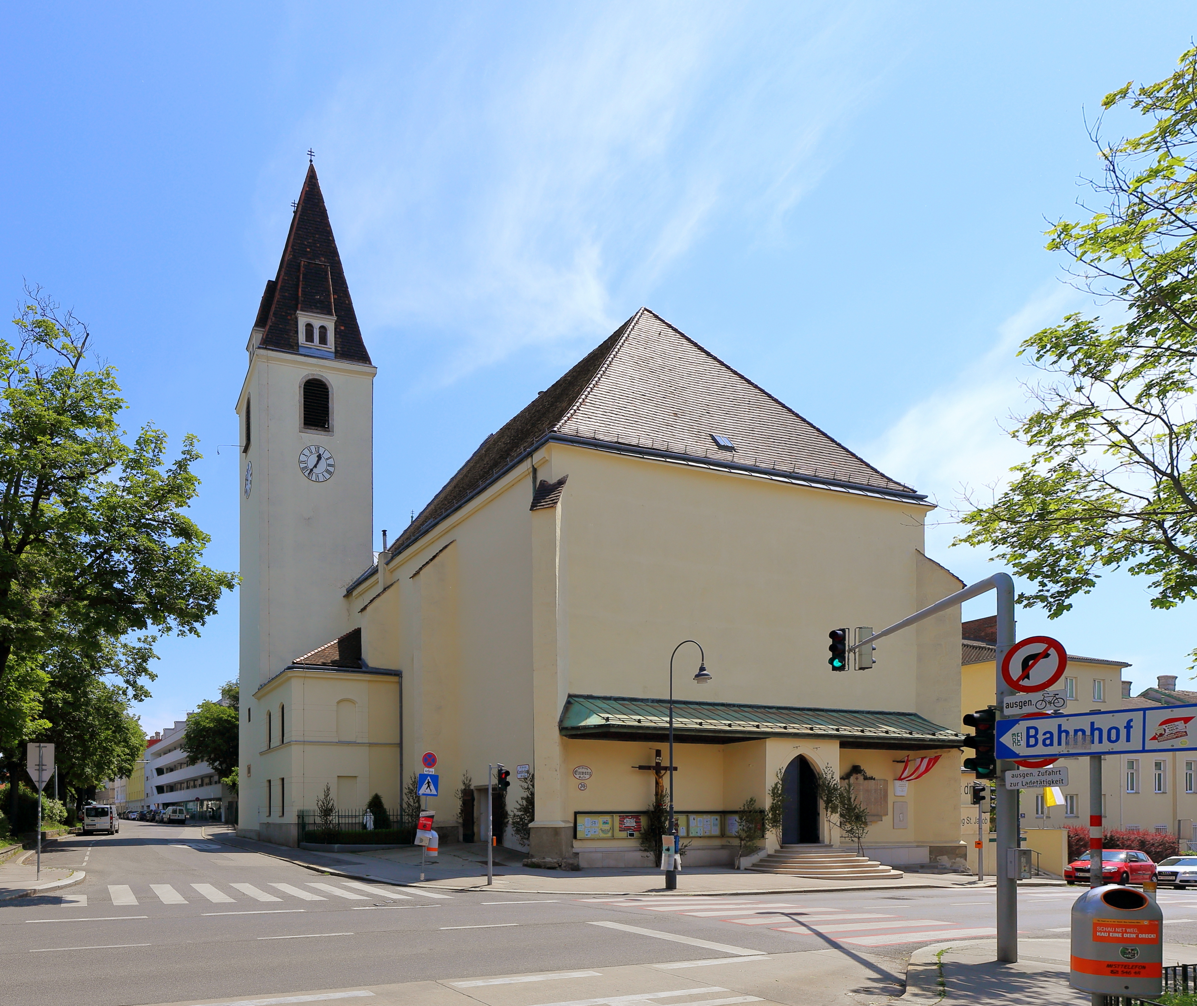 Nordwestansicht der Penzinger Pfarrkirche St. Jakob im 14. Wiener Gemeindebezirk Penzing.Im 13. Jahrhundert wurde eine Kapelle errichtet und im 14. Jahrhundert durch eine gotische Kirche überbaut. Im 15. Jahrhundert wurde das Langhaus nach Süden verbreitert. 1758 wurde durch Hofbaumeister Matthias Gerl über Veranlassung Maria Theresias die Kirche barock umgebaut und das Presbyterium Richtung Süden erweitert. Seit dem 18. Jahrhundert erfolgten kleinere Zubauten wie neue Sakristei westseitig des Turmes, Anbau der Beichtkapelle (jetziger Jakobusbrunnen) an der Südseite des Langhauses und Vergrößerung des Vorbaues am Westportal.